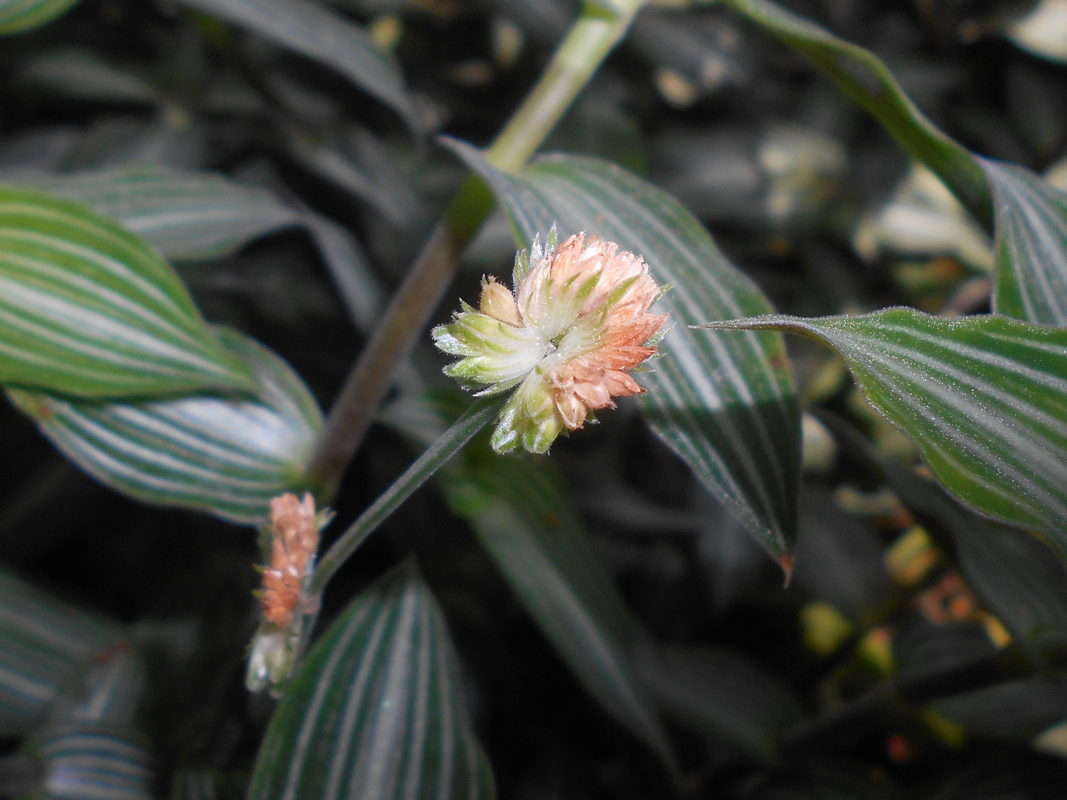 Callisia elegans, Botanischer Garten Berlin.